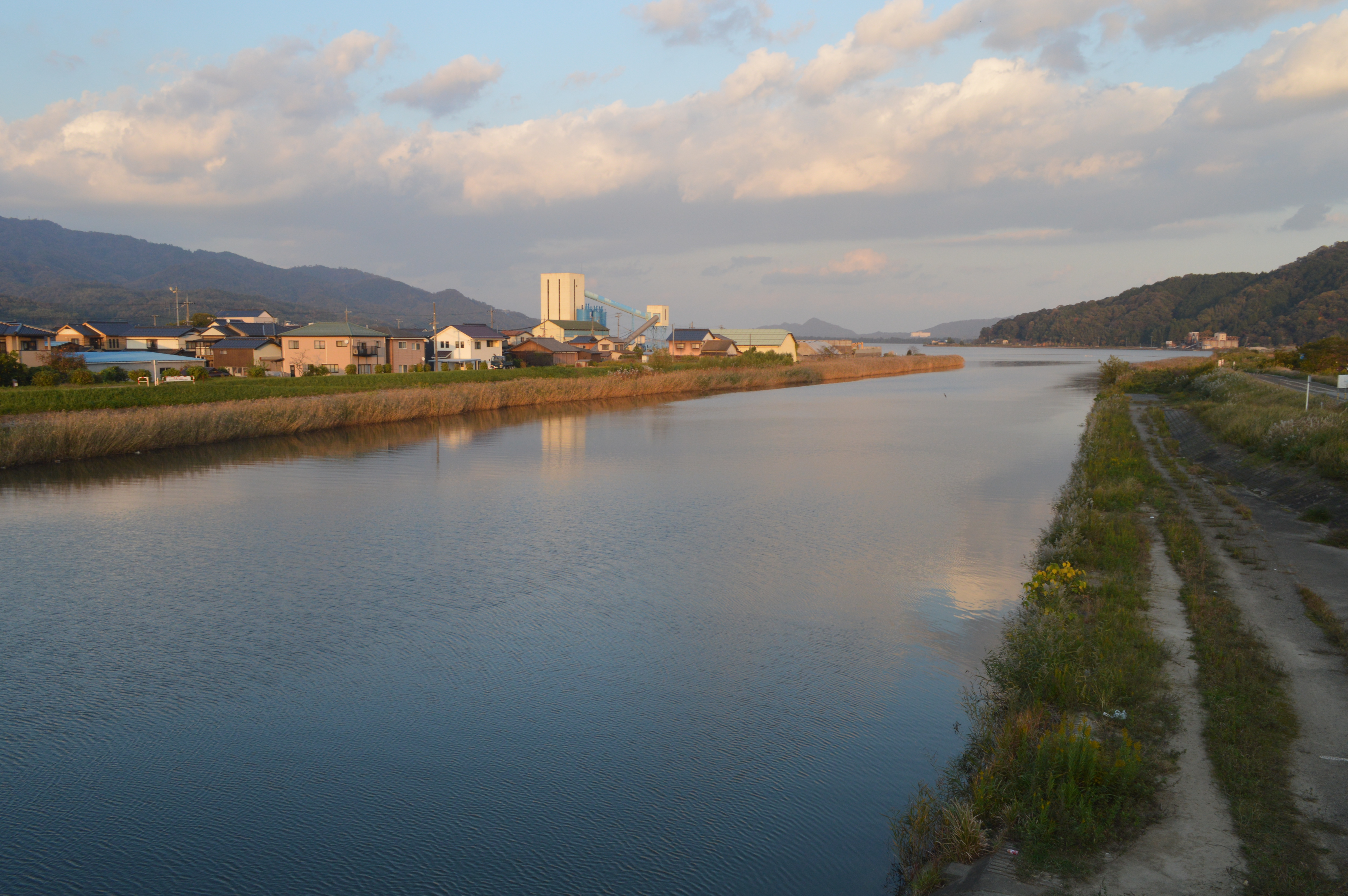 与謝郡与謝野町の野田川。阿蘇海に出る直前の河口部。国道178号の岩滝橋から下流を向いて撮影。